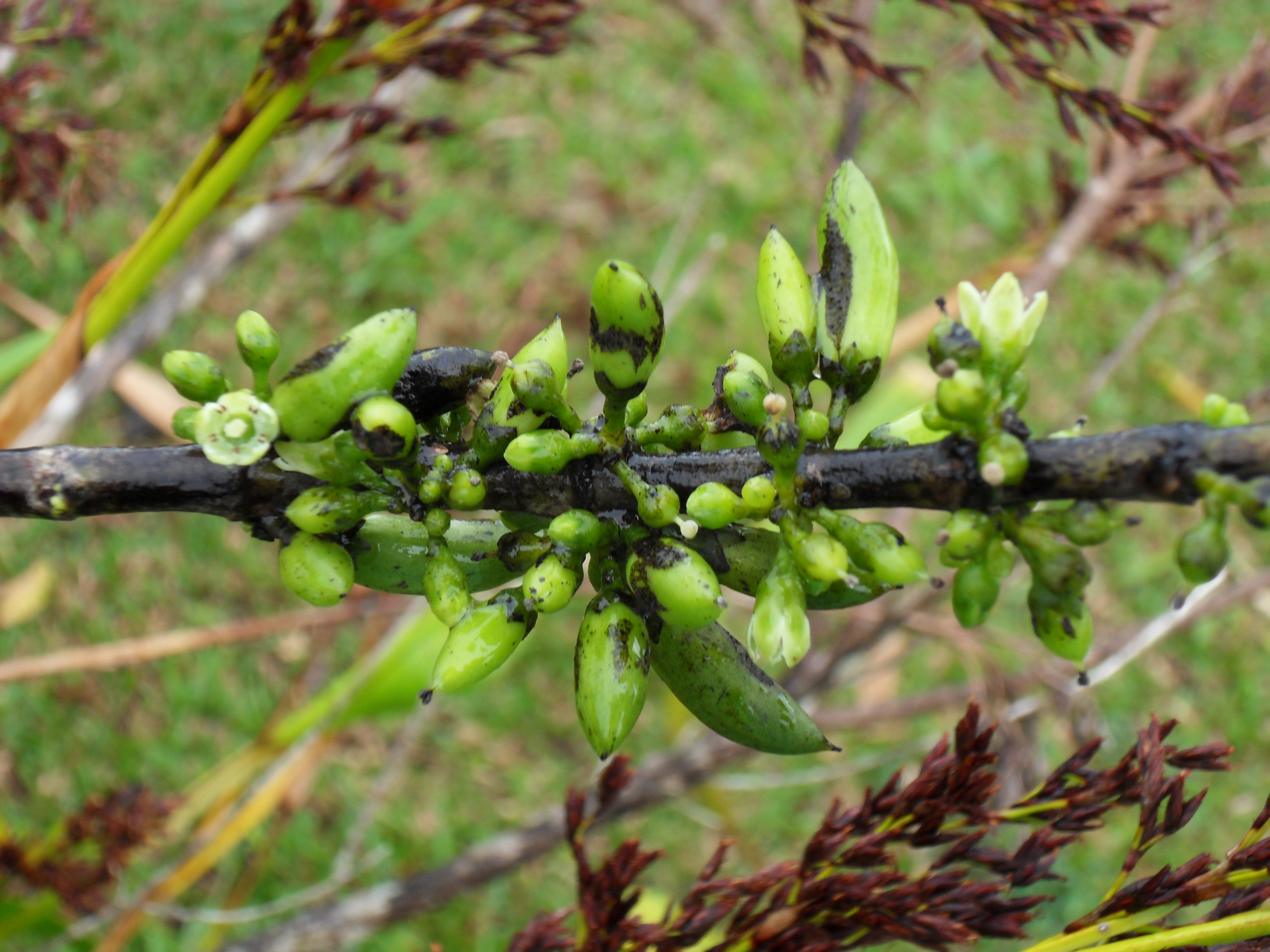 Geniostoma borbonicum (Bois de piment) détail des boutons floraux, fleurs et fruits.